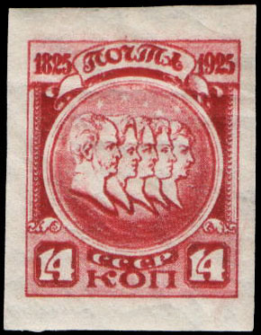 Почтовая марка СССР К 20-ти летию первой русской революции. Без зубцов.